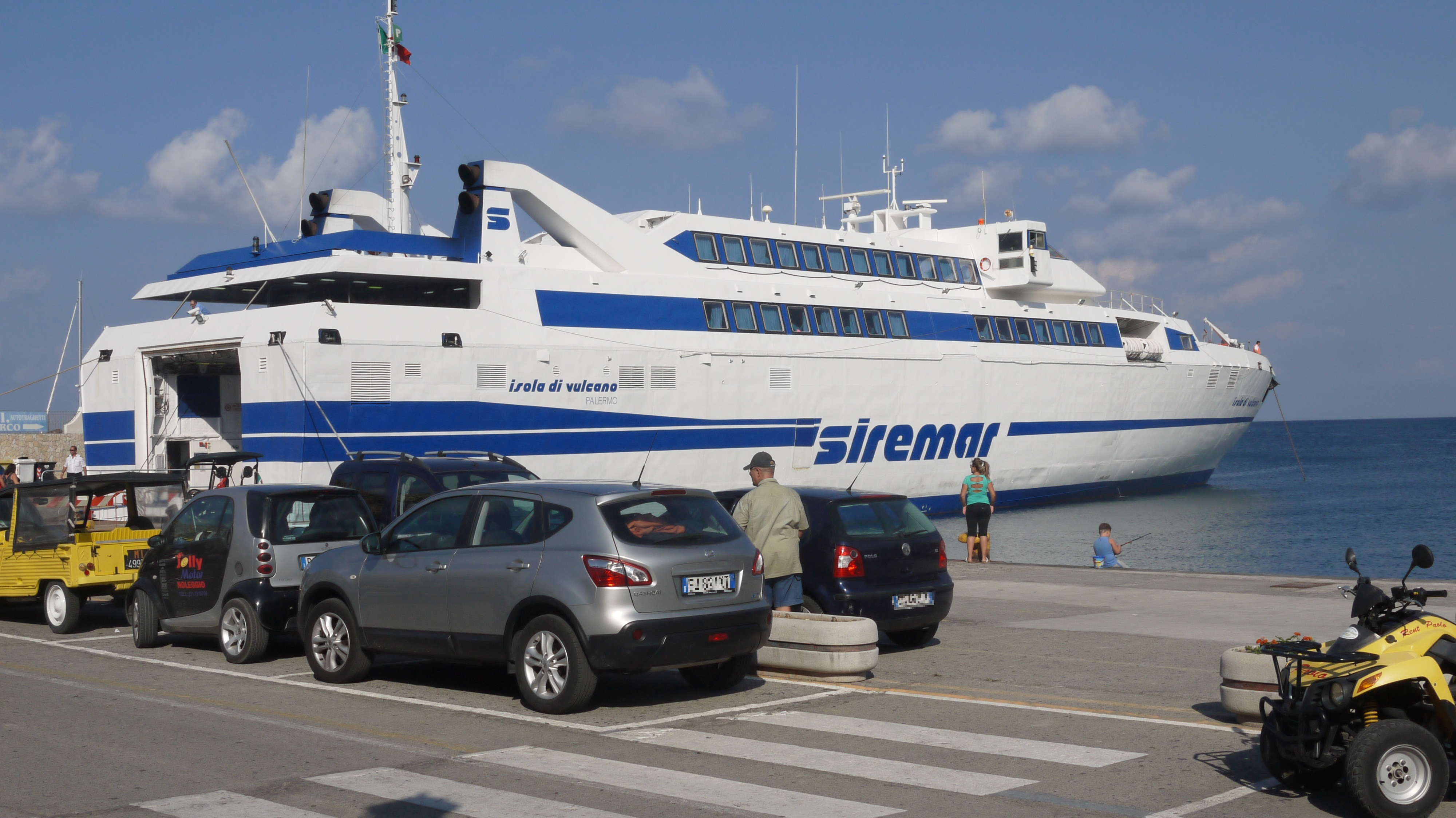 Fast ferry Isola di Vulcano at Vulcano harbour, summer 2014